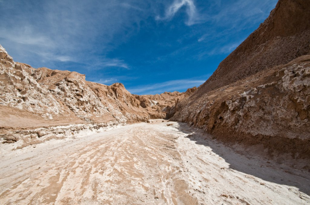 Valle de la Luna - View from canyon